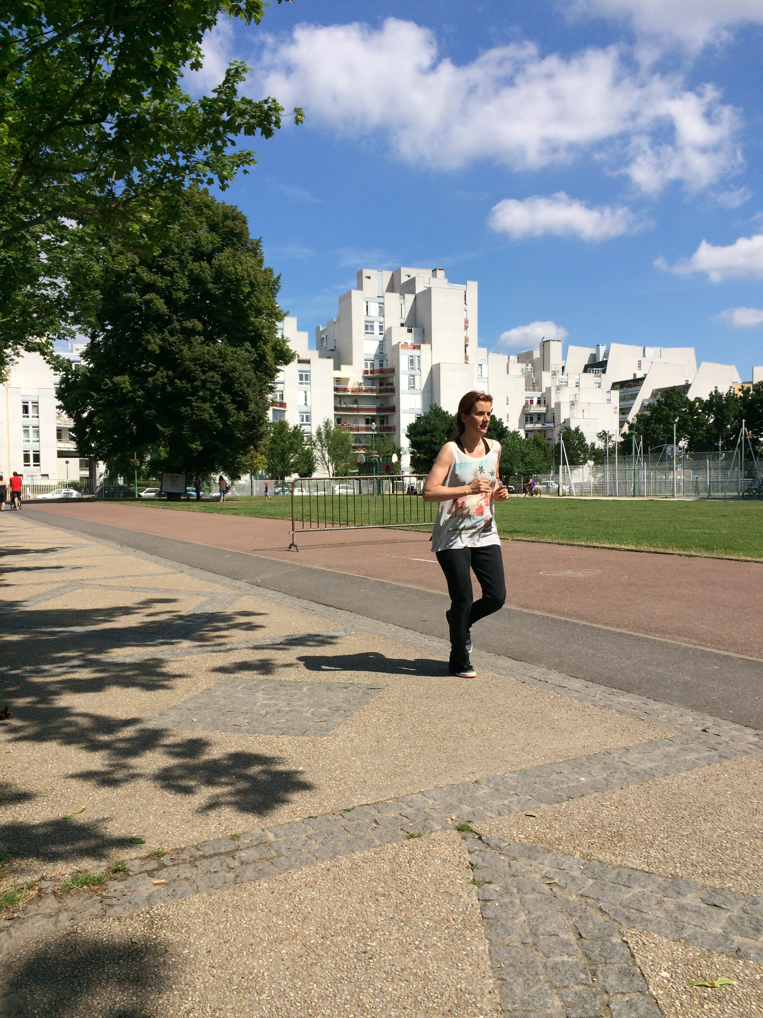 Houilles Yvelines France : Parc Charles-de-Gaulle